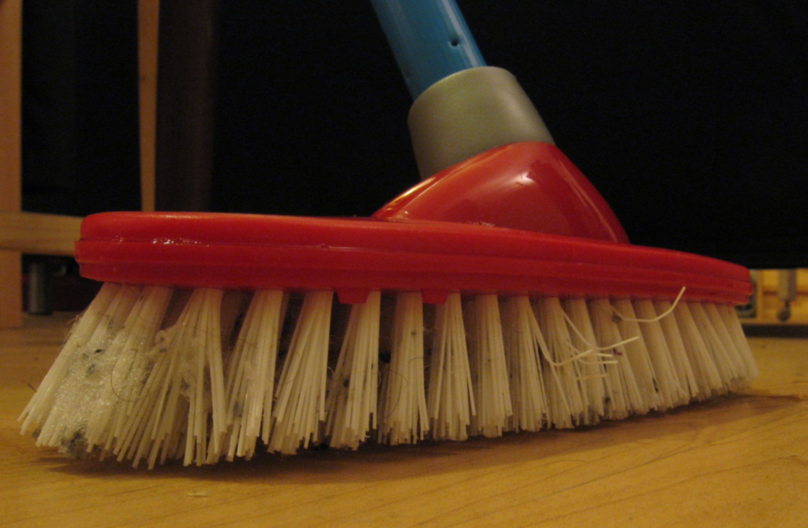 Een luiwagen detail